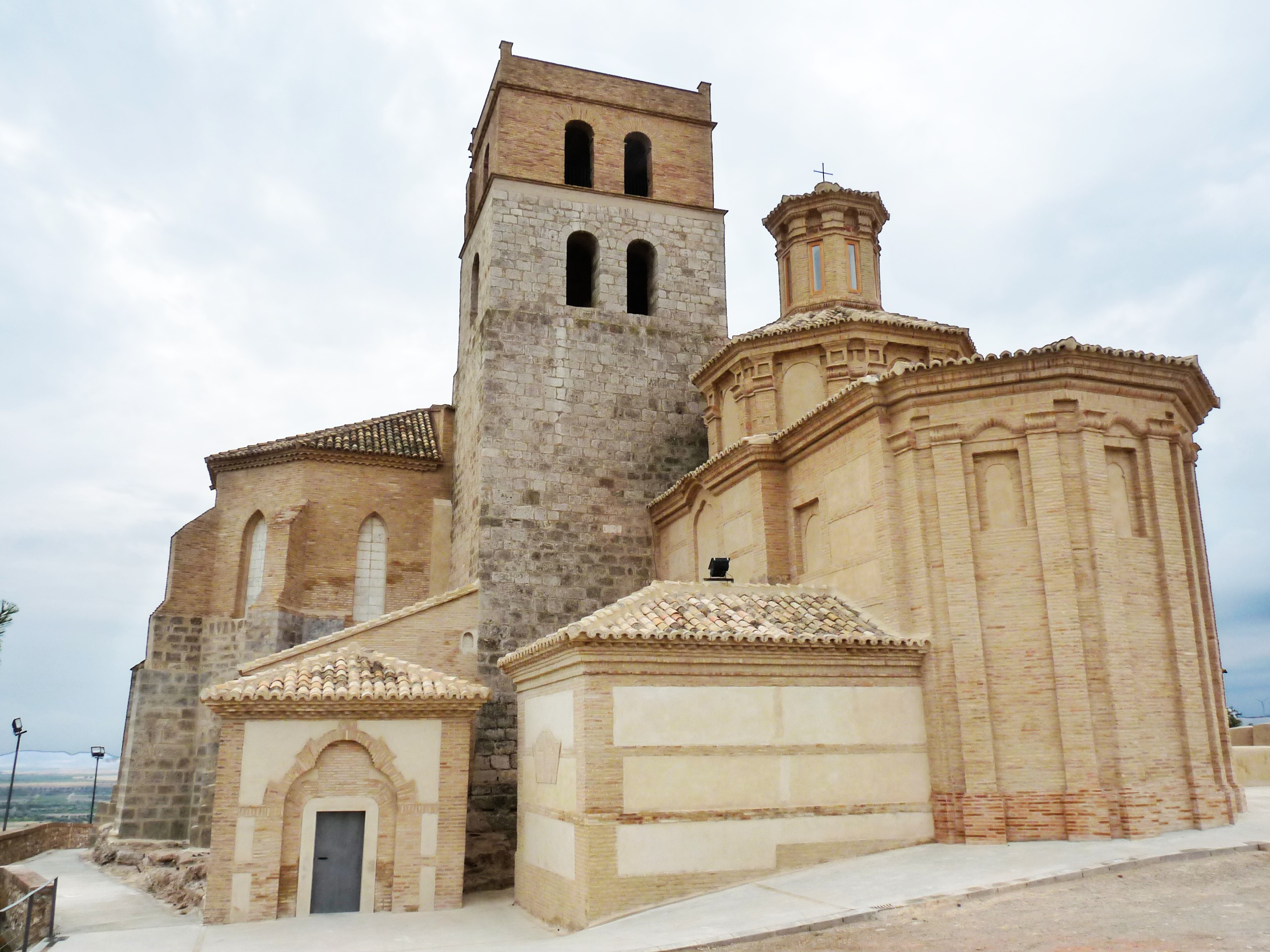 Magallón - Iglesia de San Lorenzo (s.XVI) - Ábside y torre